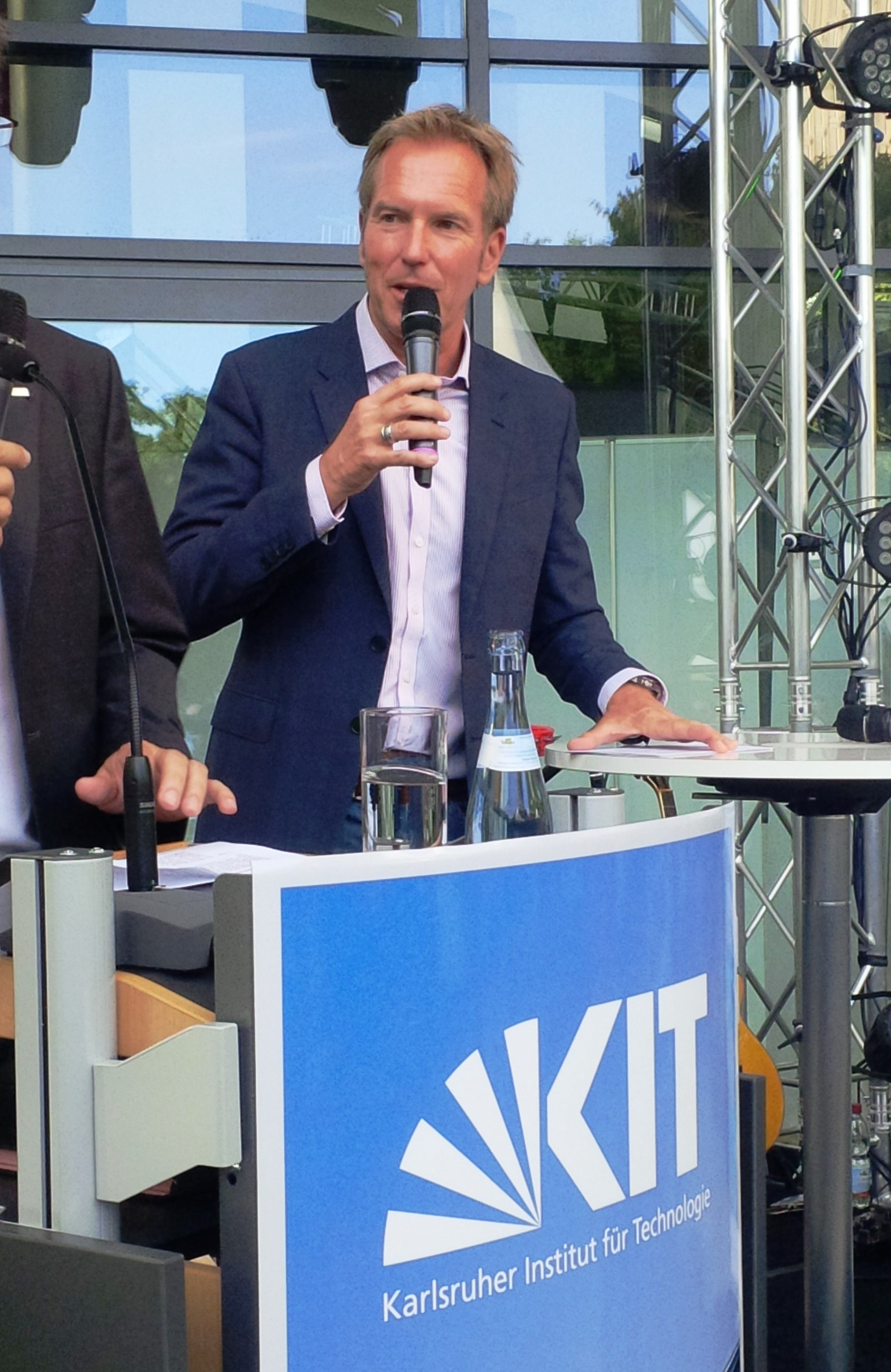 Journalist Markus Brock am KIT